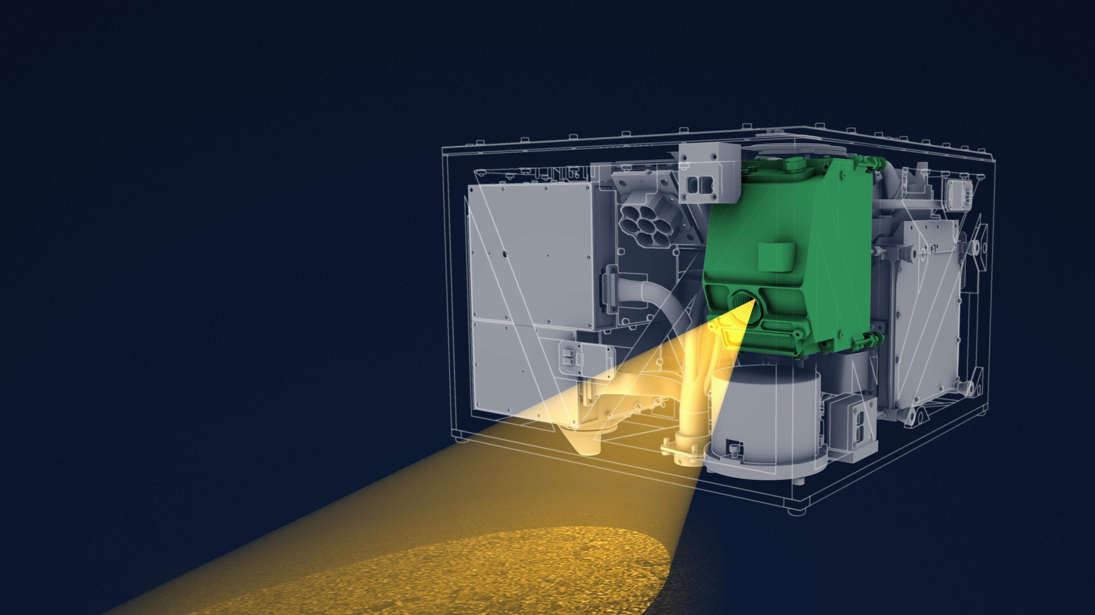 Fotocamera MASCAM installata sul rover MASCOT